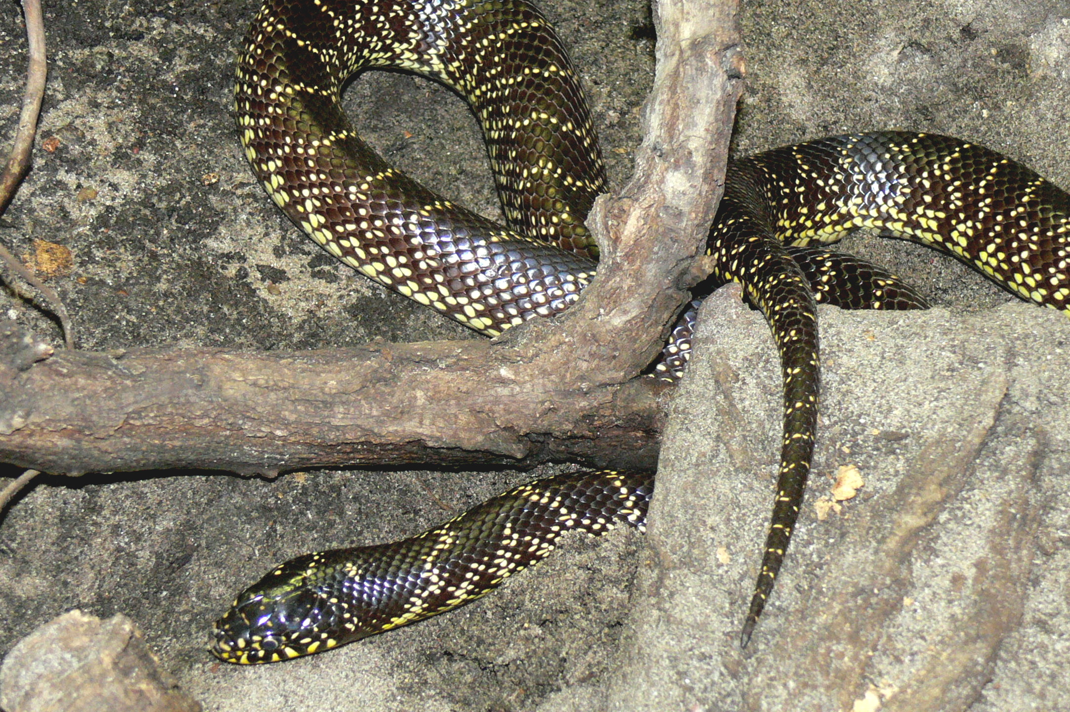 Lampropeltis getula splendida